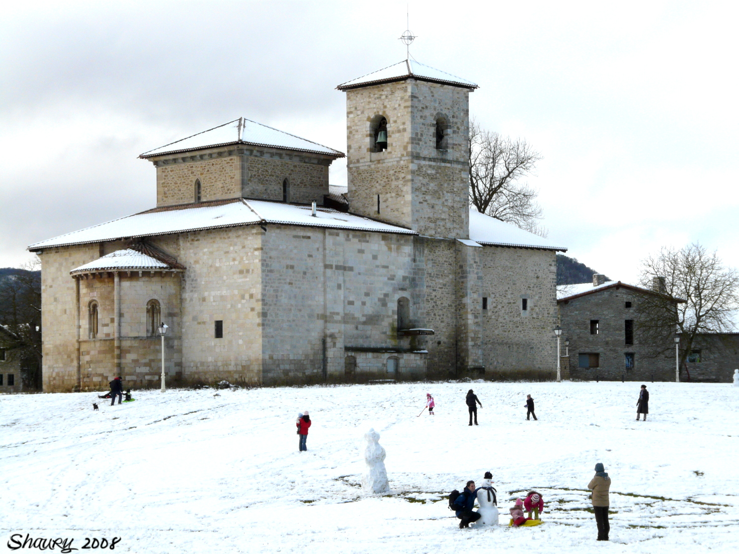 Iglesia de Armentia (Álava, País Vasco)